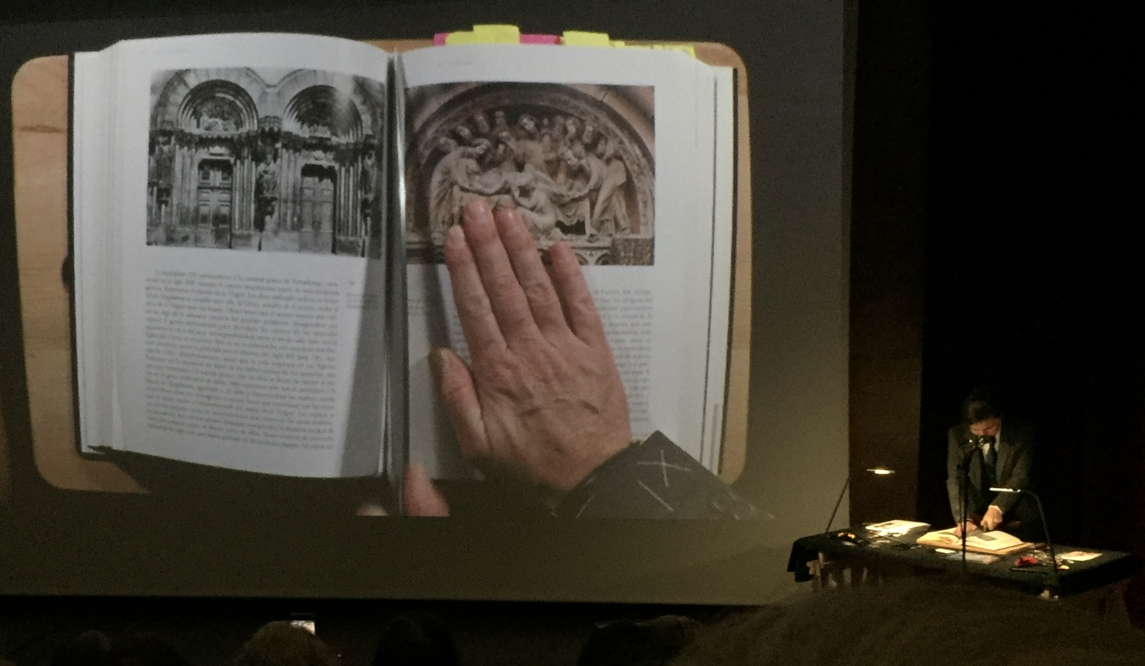 Maria Gimeno performance Queridas Viejas en el Museo del Prado de Madrid